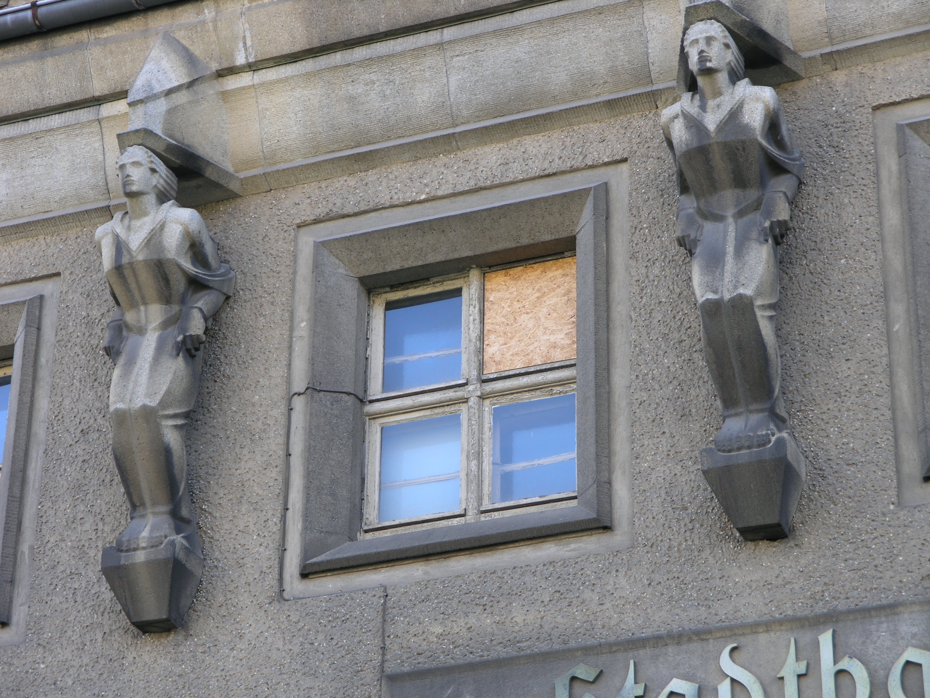 Stadtbad_Lichtenberg, zwei (von 4) "Springerfiguren" über dem Haupteingang